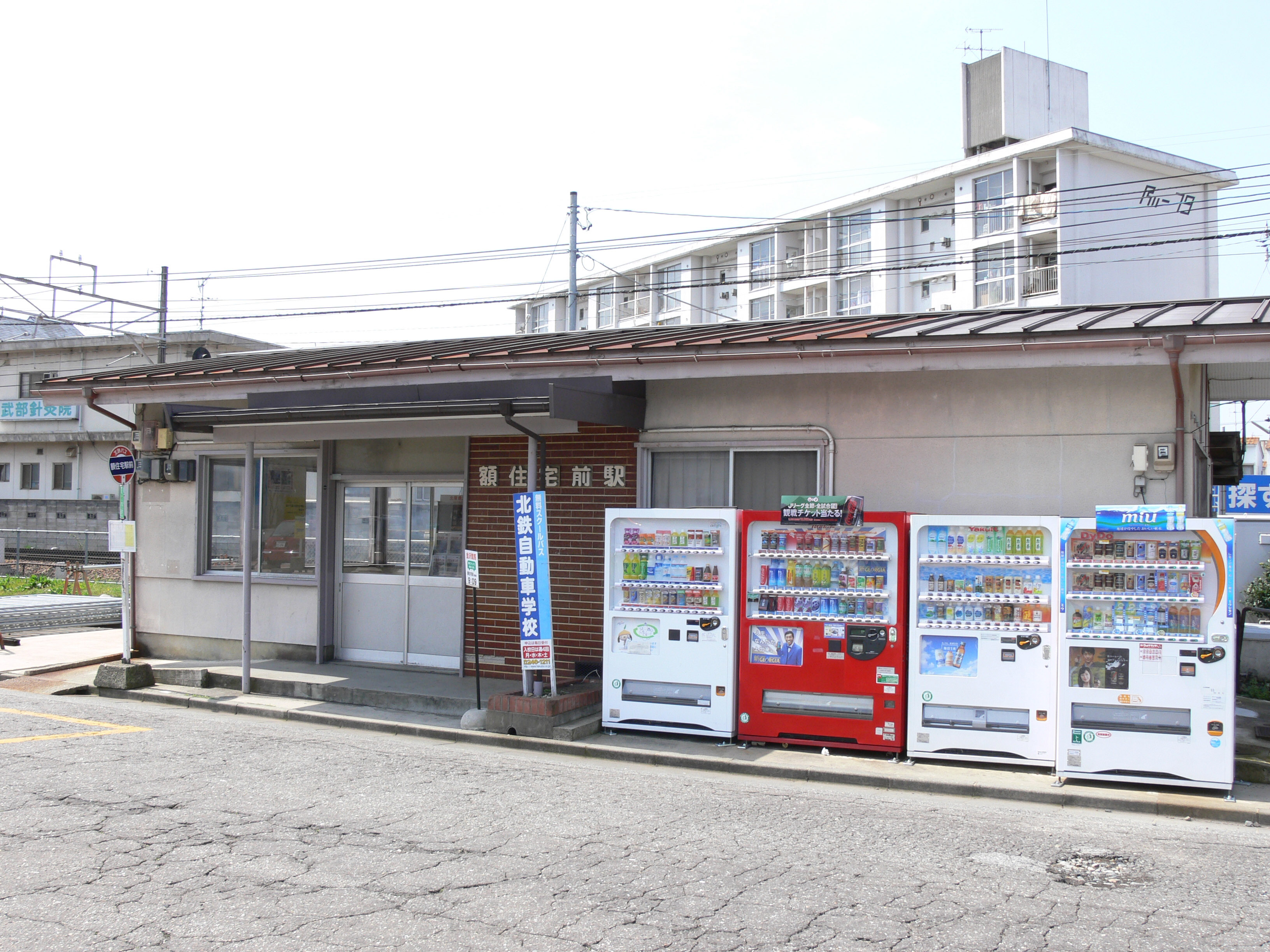 額住宅前駅